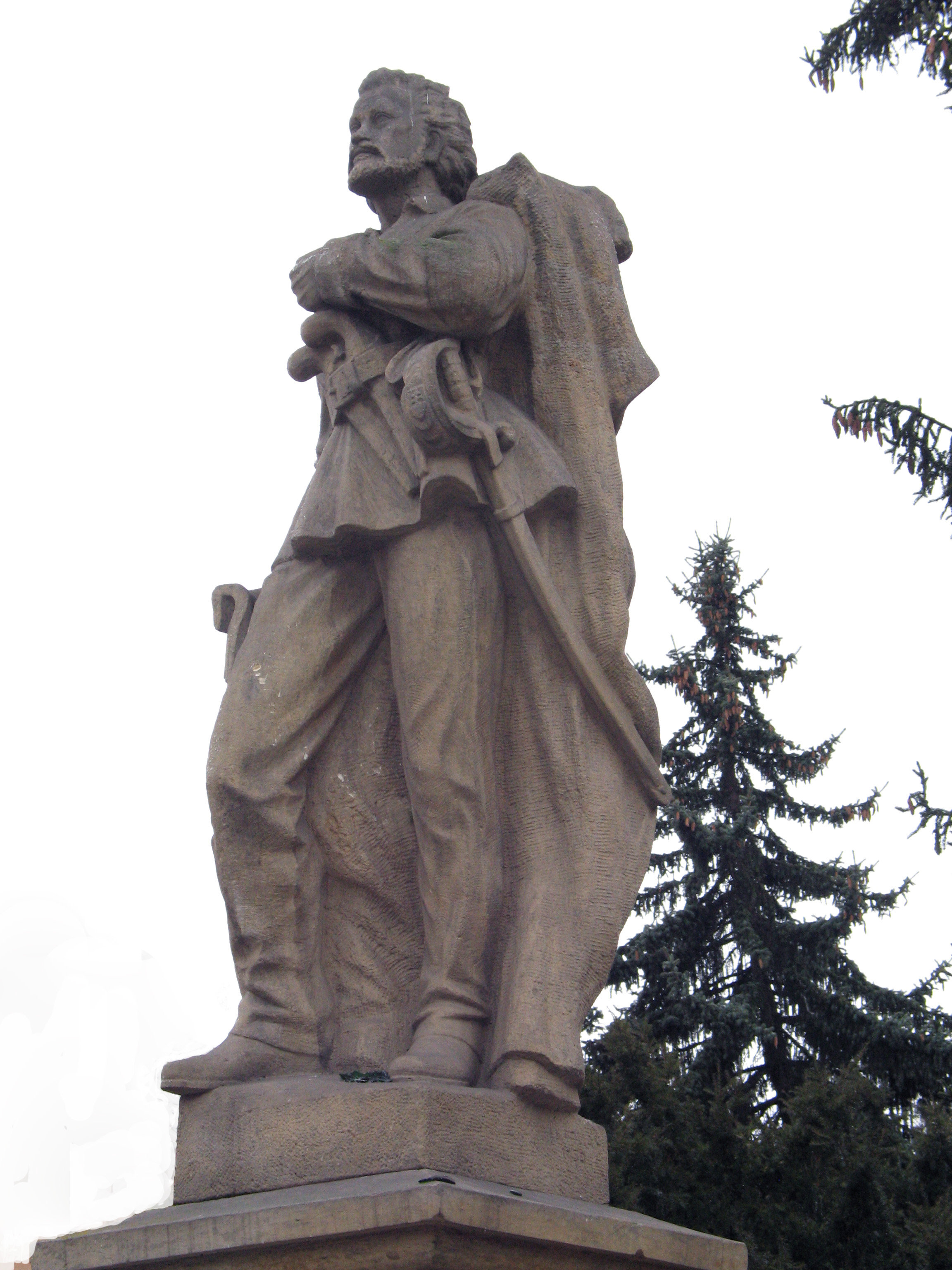 Skulptúra Jánka Kráľa na námesti Osloboditeľov v Liptovskom Mikuláši bola realizovaná v roku 1950